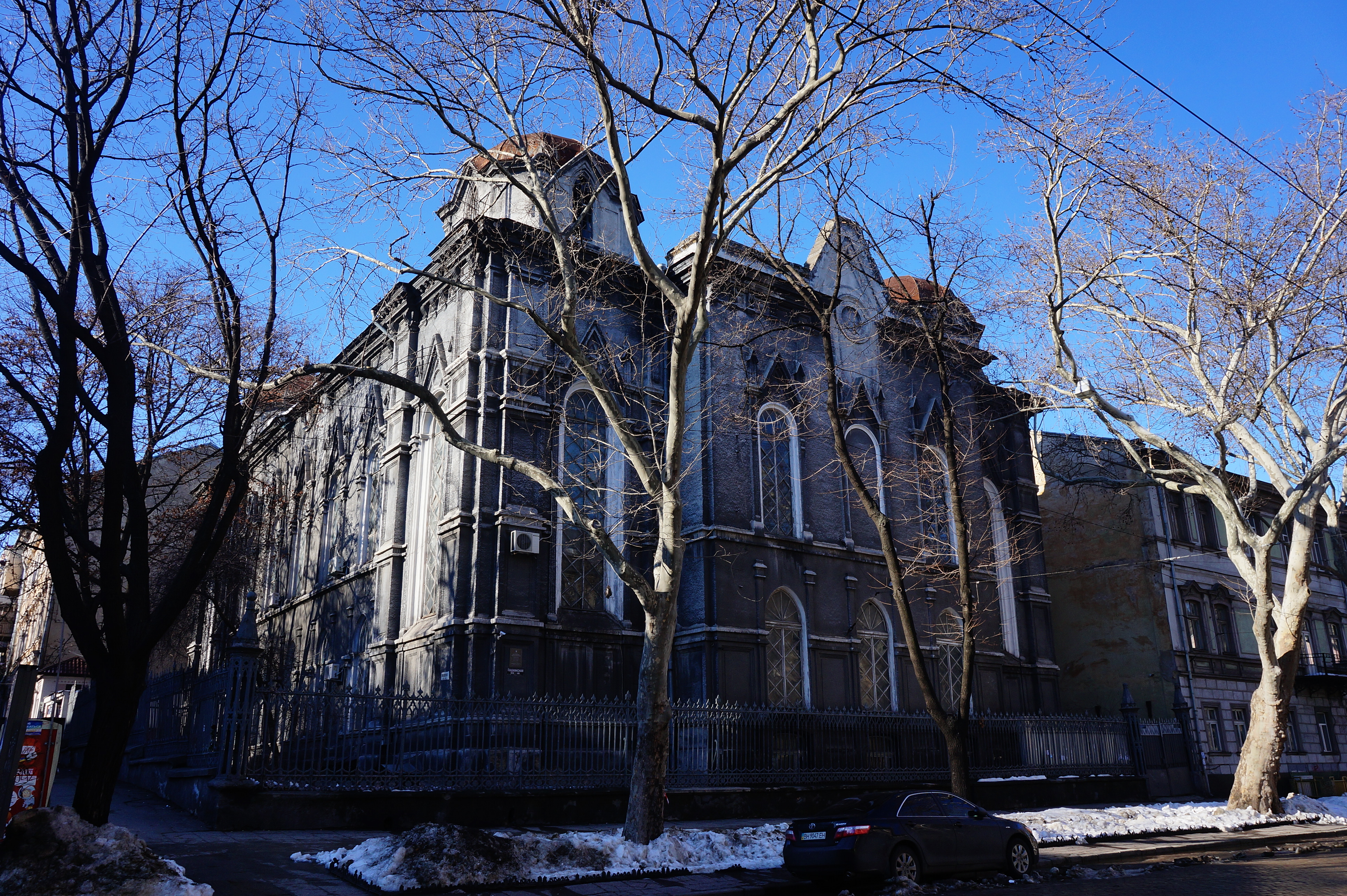 Будівля Бродської синагоги та огорожа, Одеса, вул. Пушкінська, 20/18 (ріг вулиць Пушкінської, 20 та Жуковського, 18)